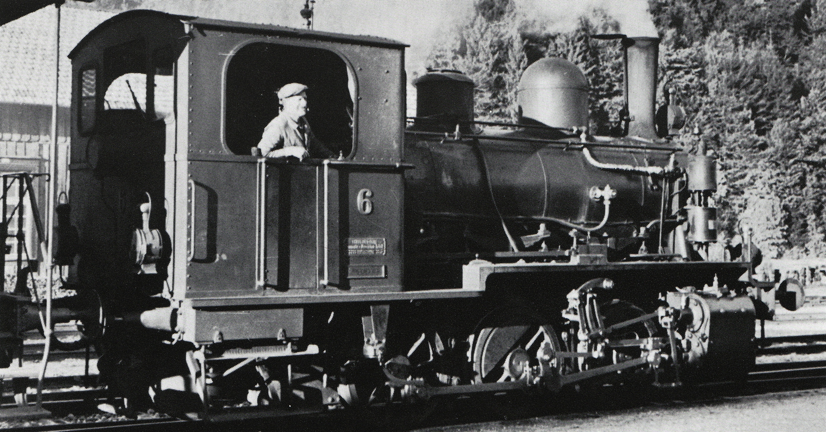 Tender-Locomotive E 3/3 Nr. 6 der Sihlthalbahn, gebaut 1912 inn der Schweizeriſchen Locomotiv- und Machines-Fabrique zů Winterthur (Fabr.-Nr. 2239), 1926 an die Uerikon—Bauma-Bahn, 1948 ans Gaswerck zů Baſel, 1956 abgebrochen.